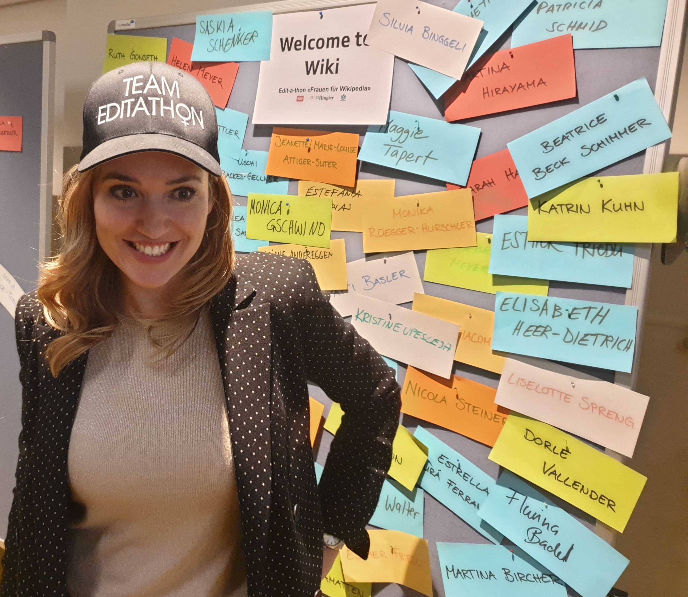 Die Ökonomin und Moderatorin Patrizia Laeri am Edithon, einem Workshop an dem Frauen Wikipediaartikel über Frauen schreiben.